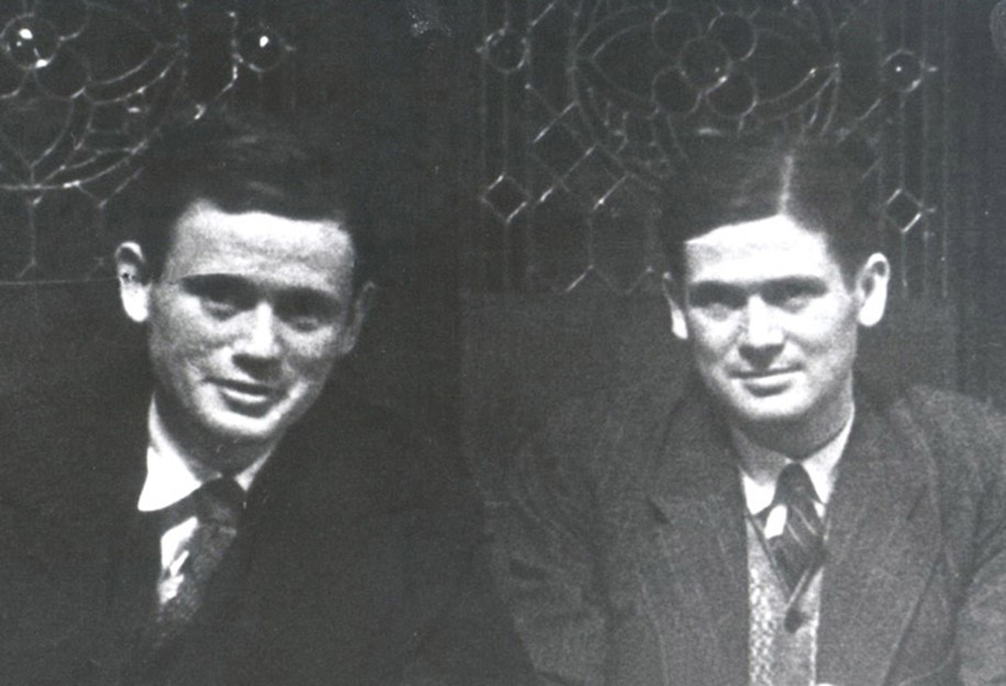 Die Firmengründer Willi Emons und Peter Emons